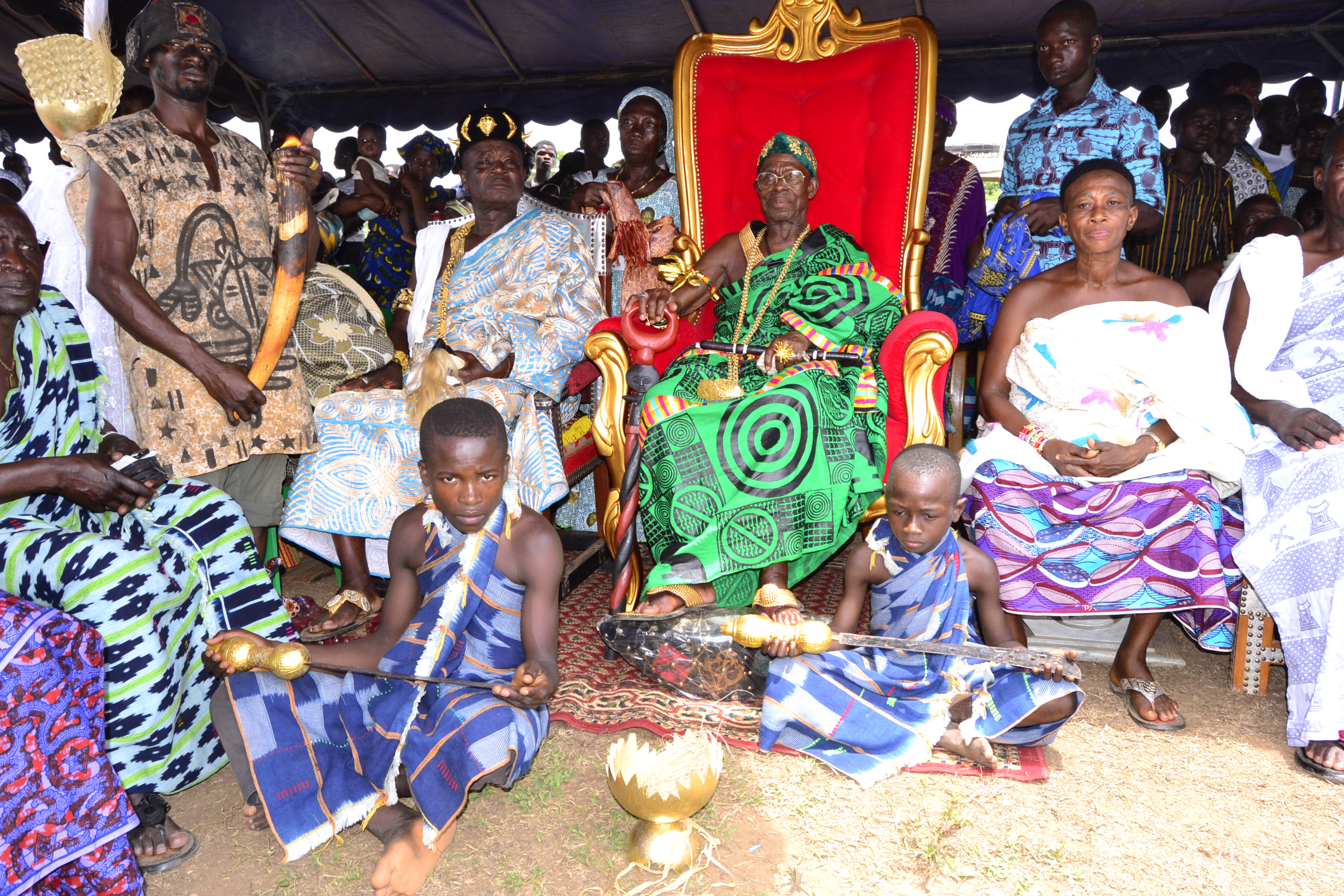 L'actuel rois Abron (Bron) encadreé par la reine, ses guerriers, son porte canne, son chasse mouche, deux enfants tenants des sabres et assis devant le roi.